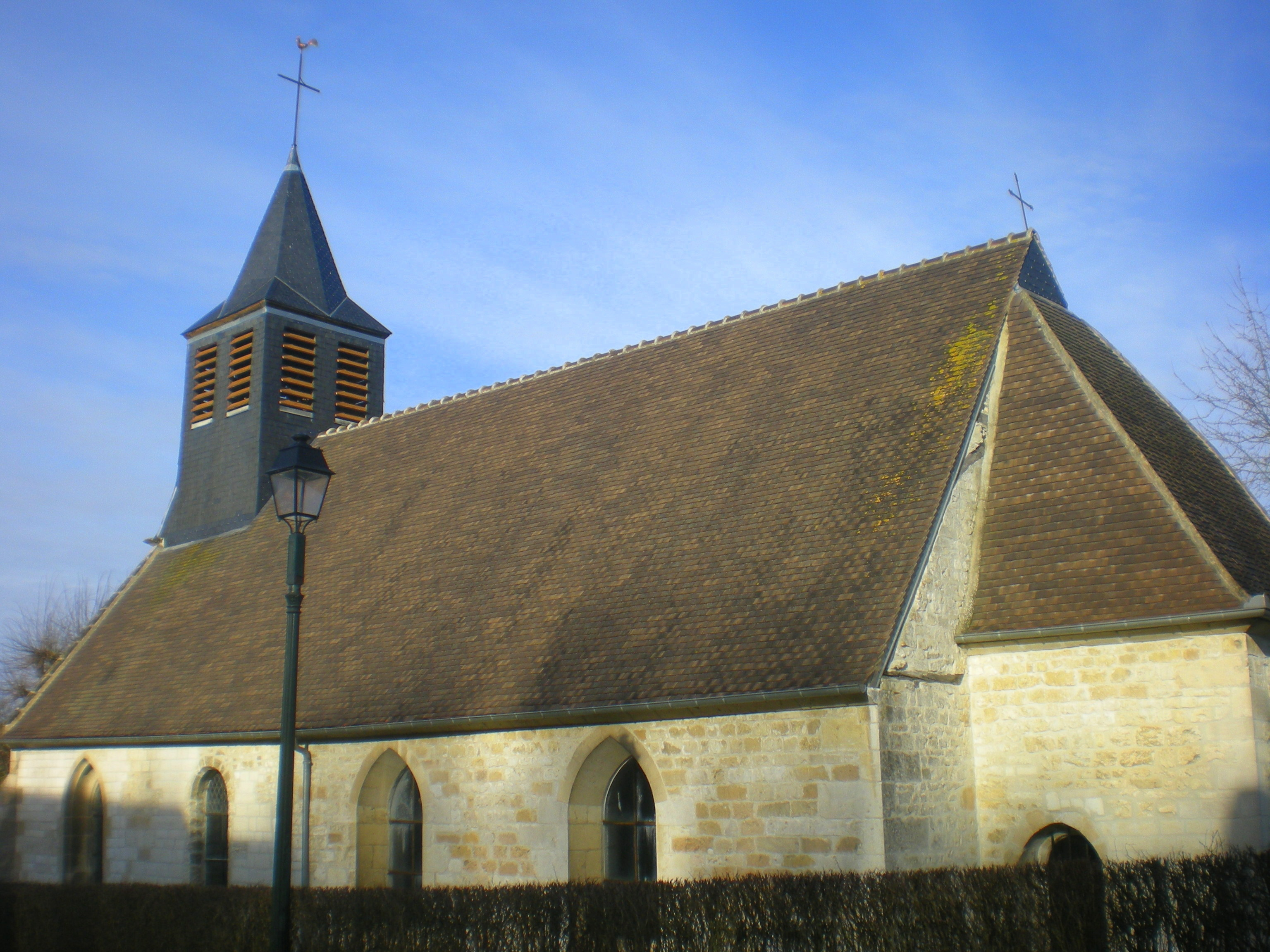 L'église Saint-Aubin de Saint-Aubin-sous-Erquery (Oise) depuis le sud-est.